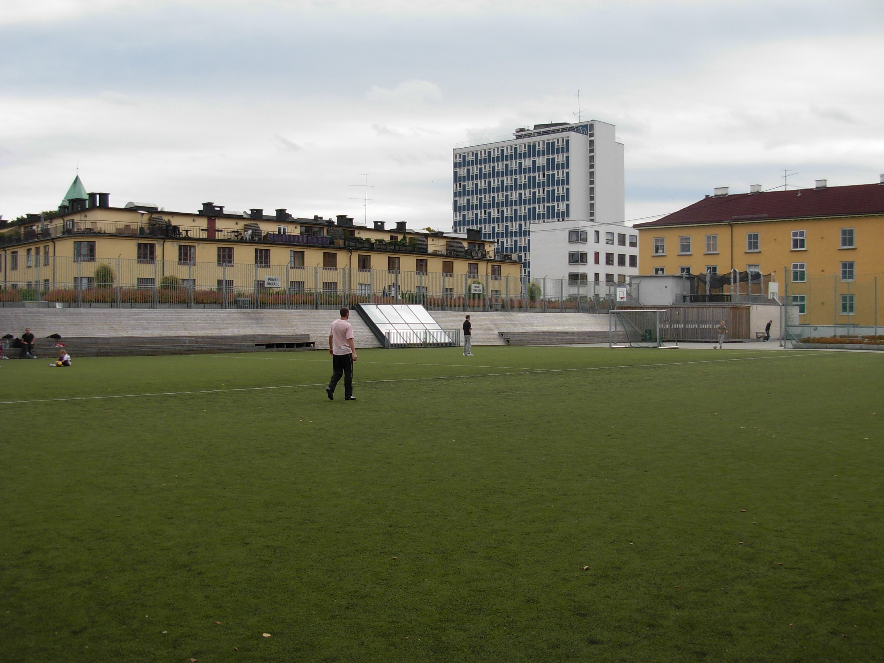 Falch Ytters plass, sett mot sydvest